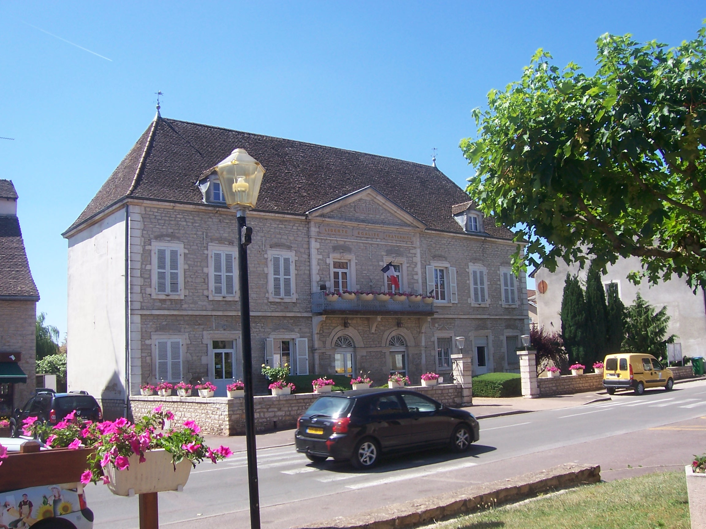 Mairie d'Ouroux-sur-Saône